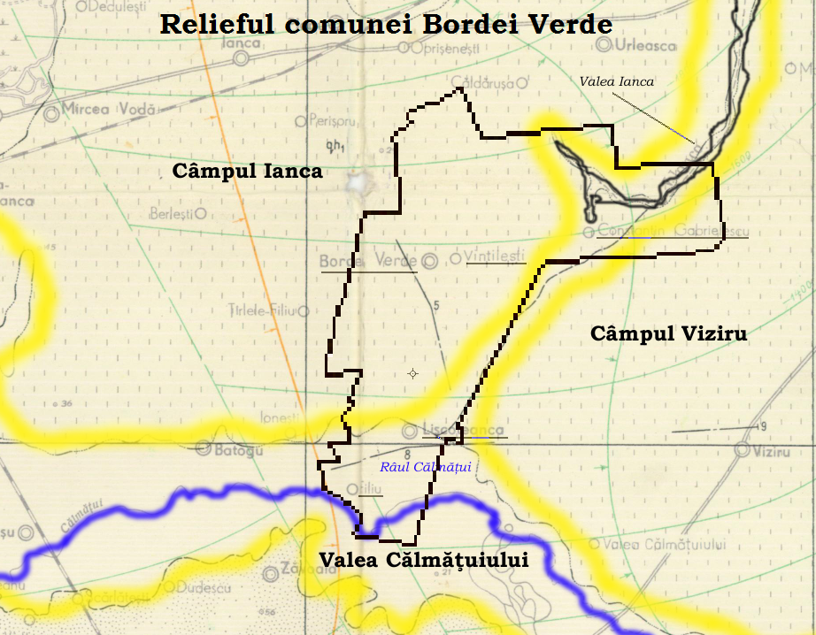 Autor - Macreanu Iulian Descriere - O hartă prelucrată de mine cu principalele unităţi de relief din comuna Bordei Verde Restricţii - fişierul poate fi utilizat fără restricţii Comentarii - harta a fost realizată având la bază informaţiile din Harta Geologică a României, ediţie 1928, publicată deja pe Wiki Commons (File:RomGeolActual.jpg)